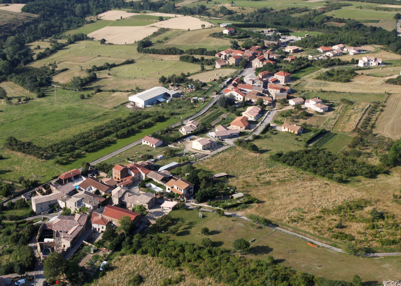 Brossainc détail